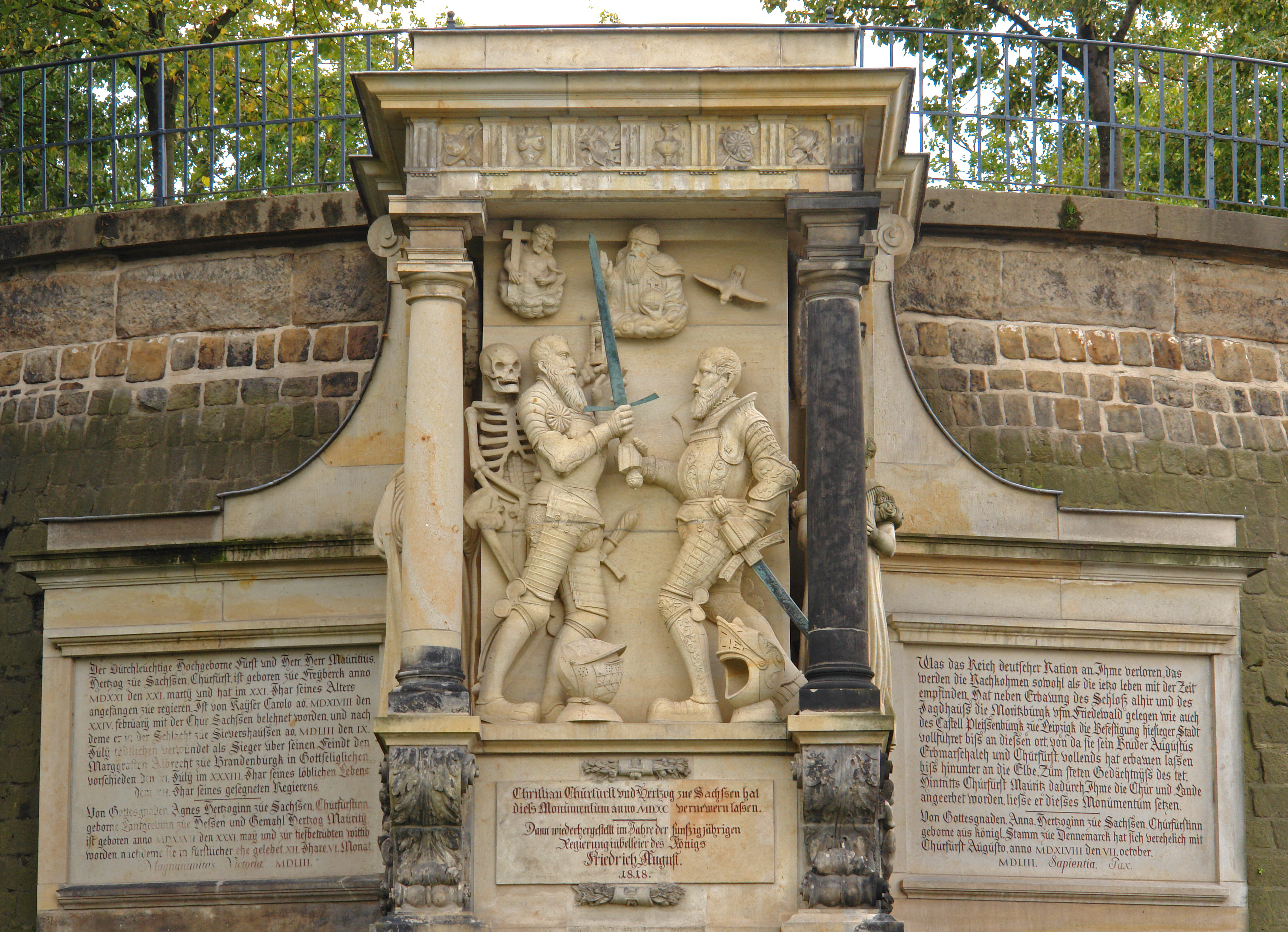 Moritzmonument von Hans Waltherː Markrabě Mořic Saský předává vládu svému bratru Augustovi